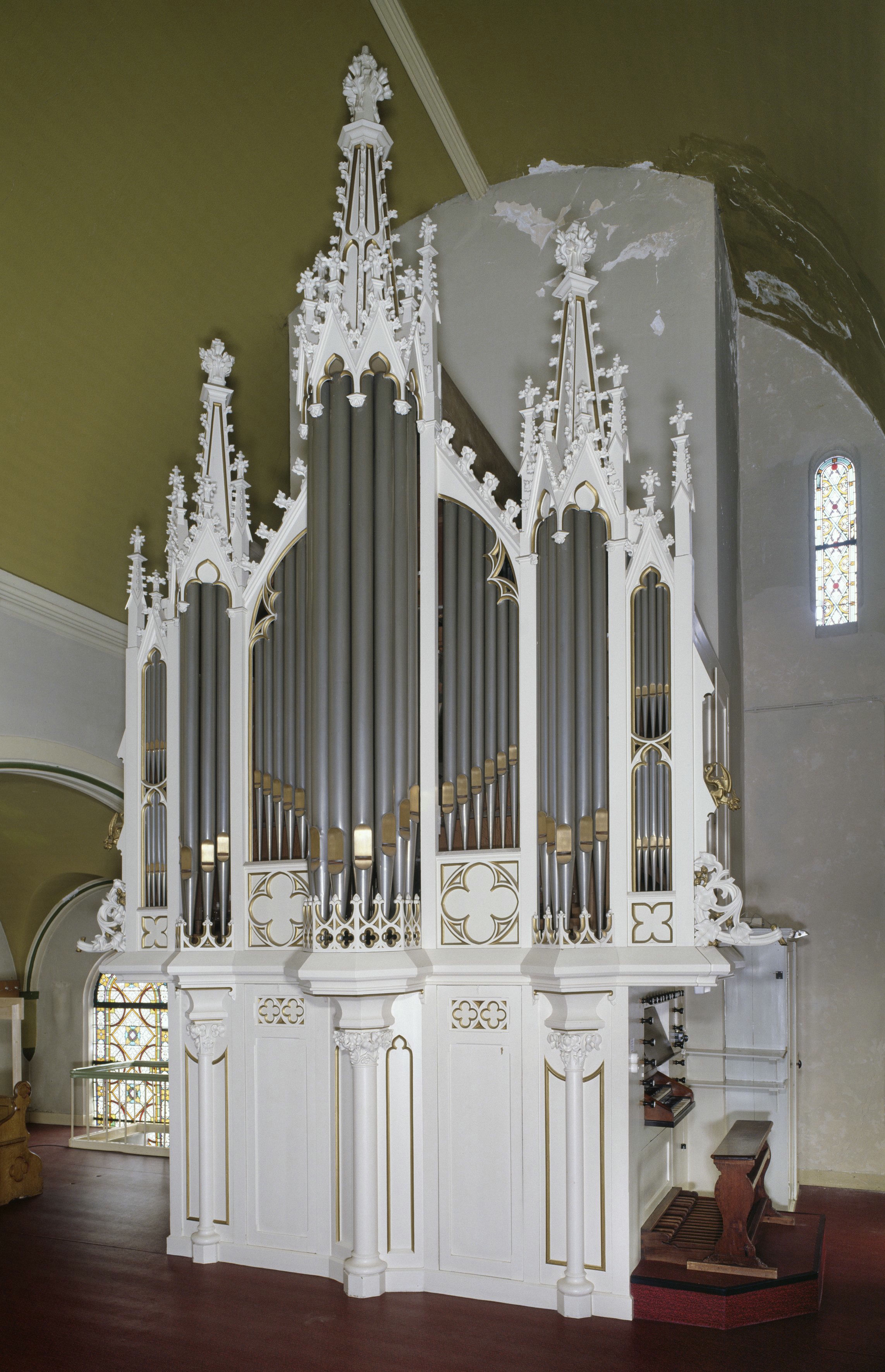 Rooms-katholieke Kerk Sint-Jan de Doper: Interieur, aanzicht orgel, orgelnummer 321 (opmerking: Gefotografeerd voor Het Historische Orgel in Nederland 1878-1886, Bladzijde 71)